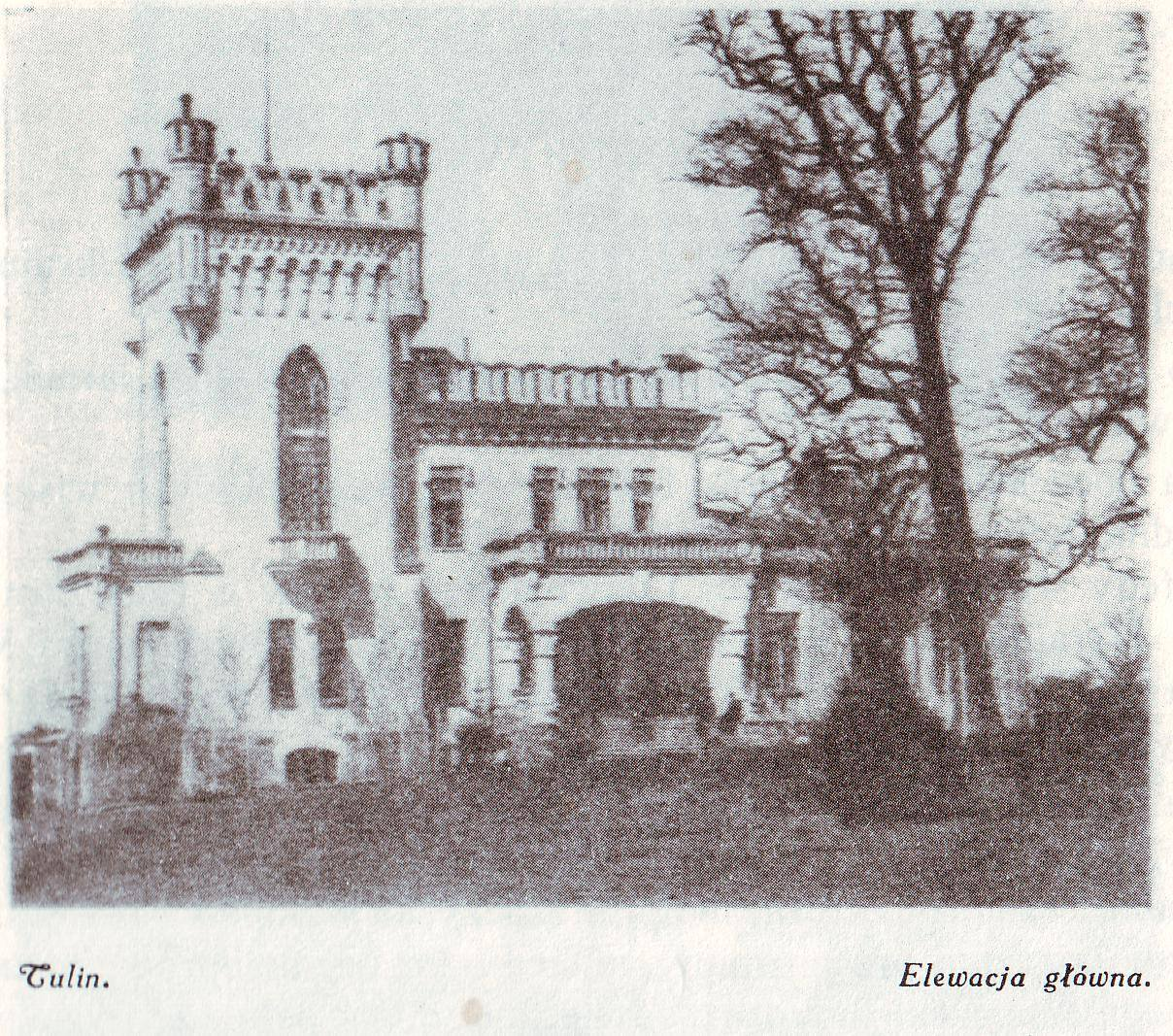 Tulin